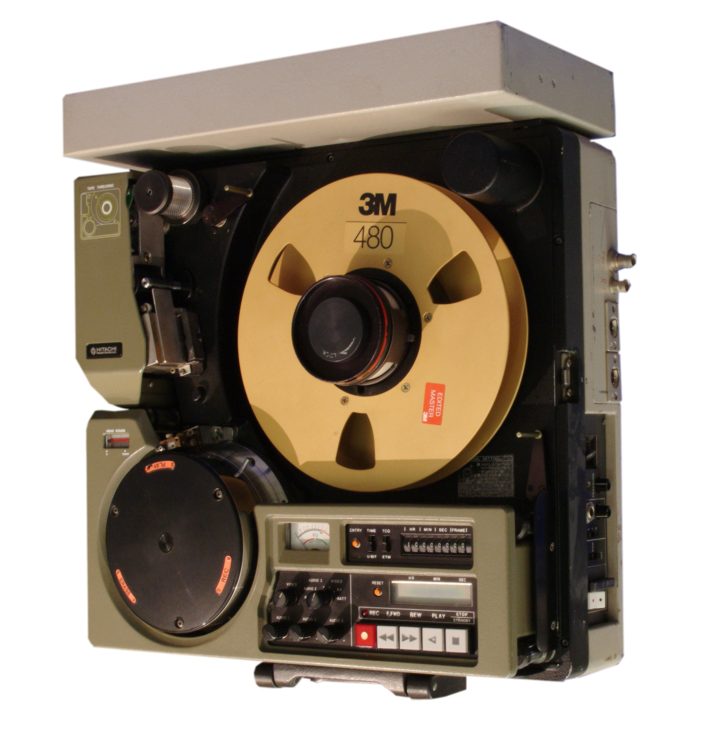 HITACHI 1 Zoll-C-Maschine